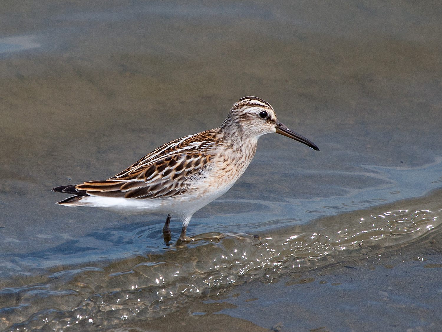 キリアイ 北海道石狩